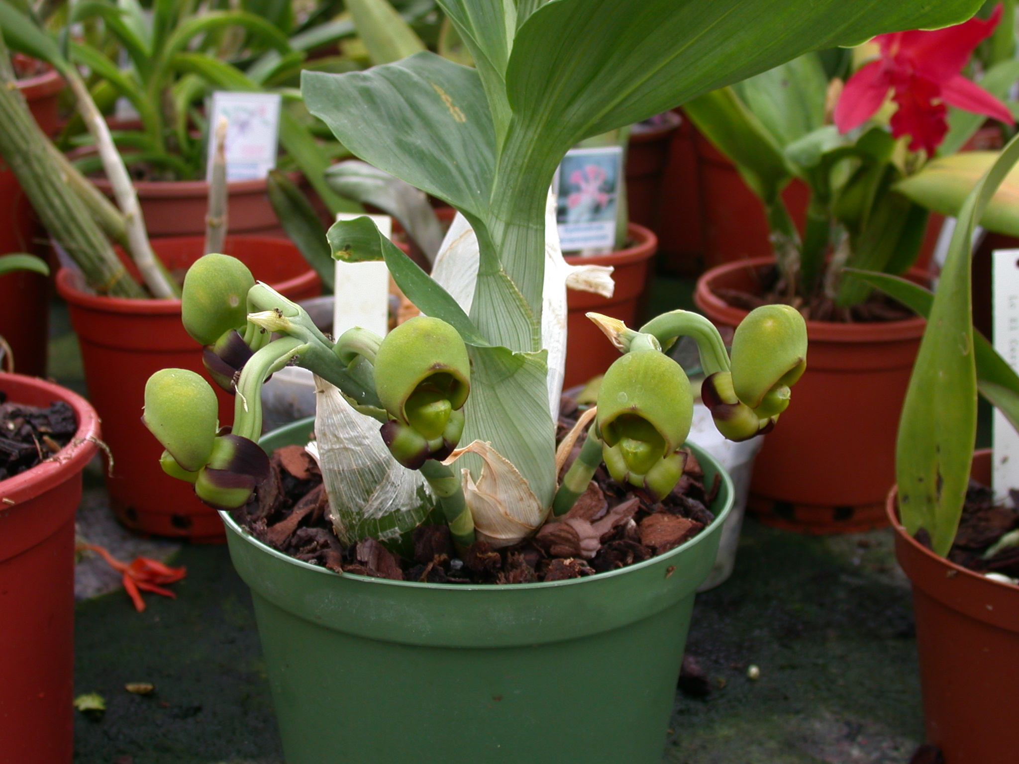 Catasetum tenebrosum female